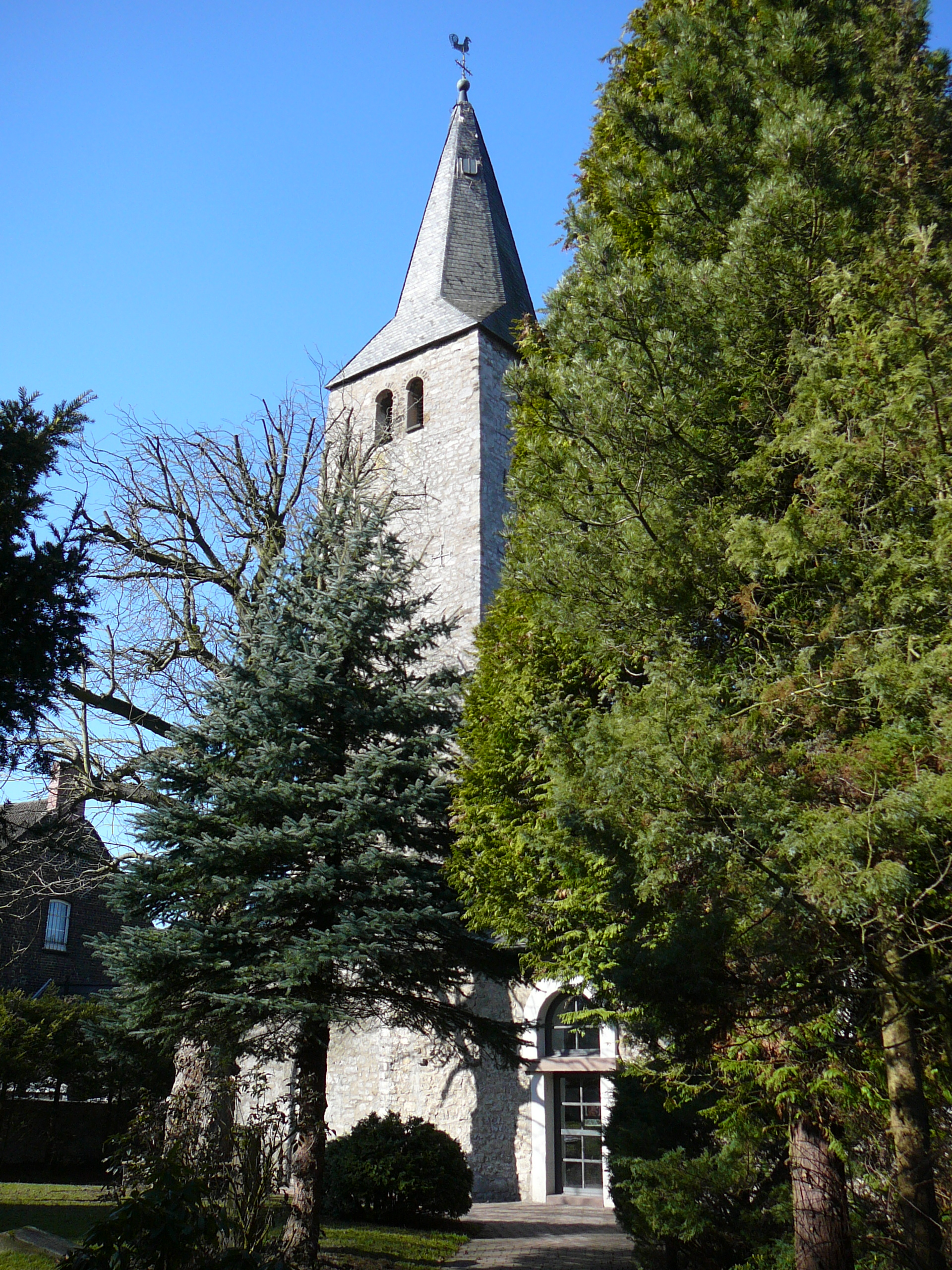 Wuppertal, Schöllerweg (Pfarrkirche Schöller und evangelischer Kirchgarten Schöller)This is a photograph of an architectural monument. 1441